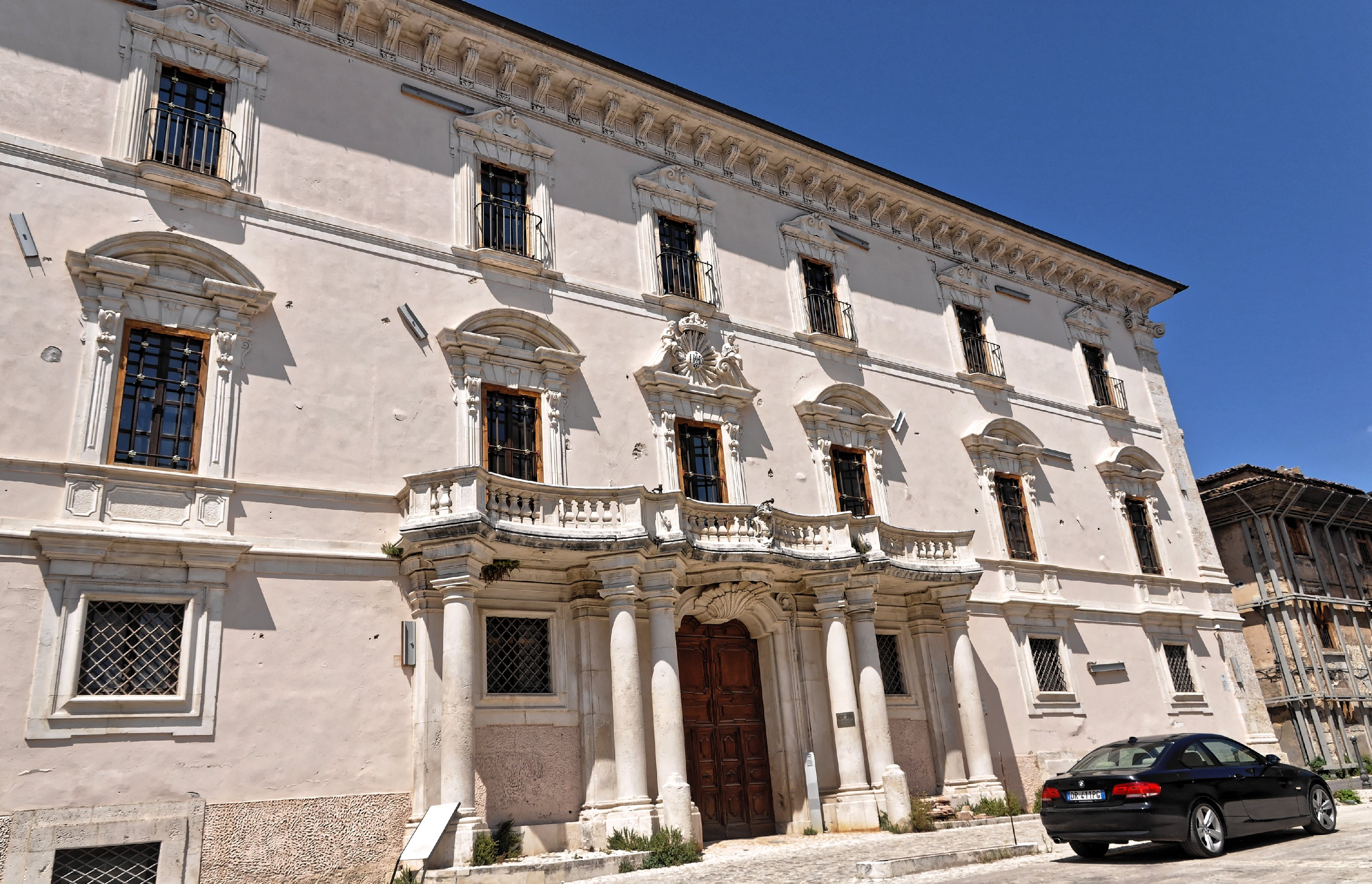 L’Aquila 2013 Dieses Foto entstand in Zusammenarbeit mit Stadtbesichtigungen.de Die Seiten Stadtbesichtigungen.de, der dazugehörige Reise Blog sowie die Facebookseite: Stadtbesichtigungen Rom dürfen dieses Bild für Ihre Veröffentlichungen ohne den Hinweis auf Wikipedia, Commons bzw der Lizenz verwenden. Die Verantwortlichen habe von mir (Ra Boe) die Originaldaten zur freien Verfügung übermittelt bekommen.